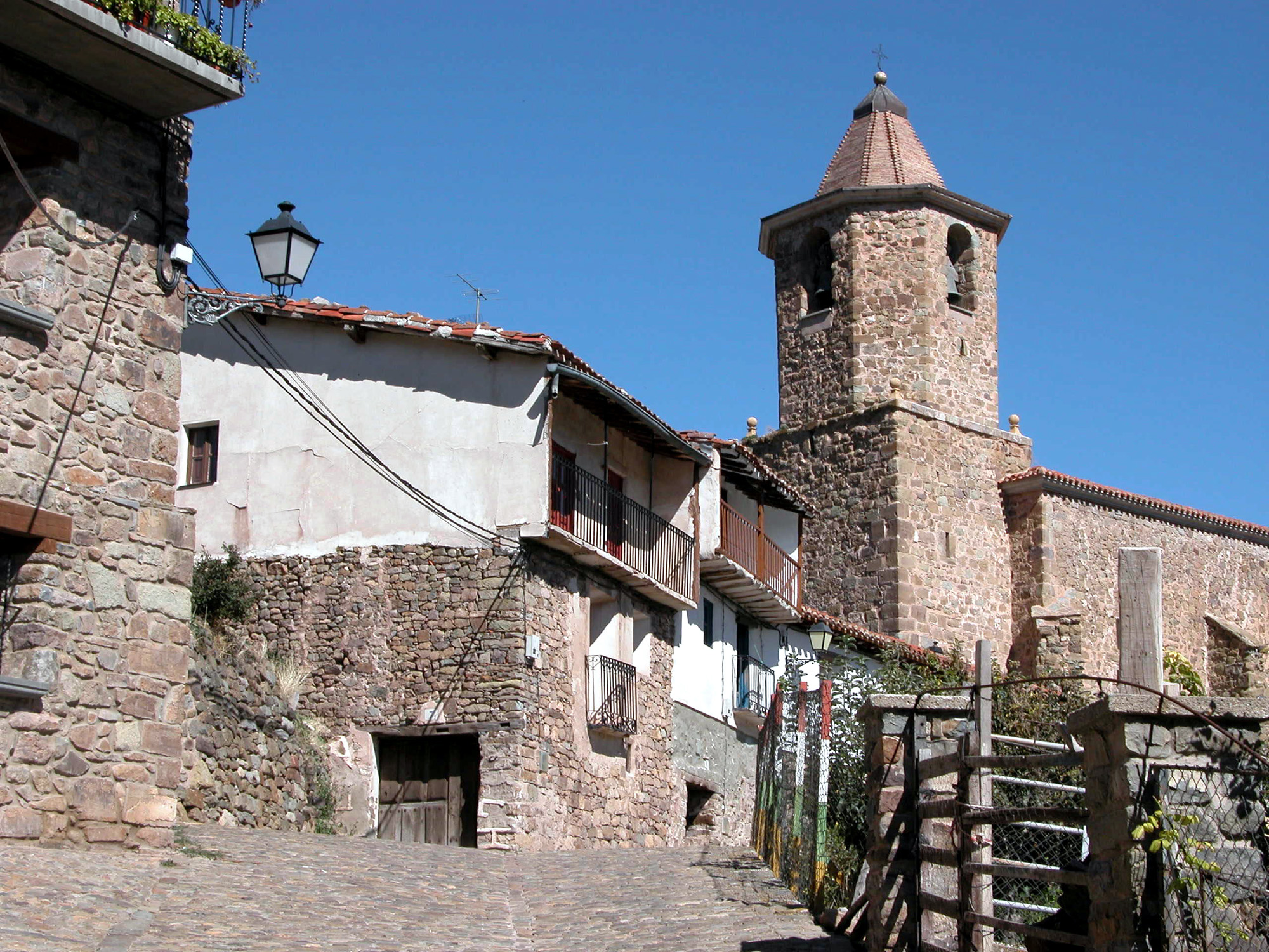 Igesia de San Miguel en Jalón de Cameros, La Rioja - España.